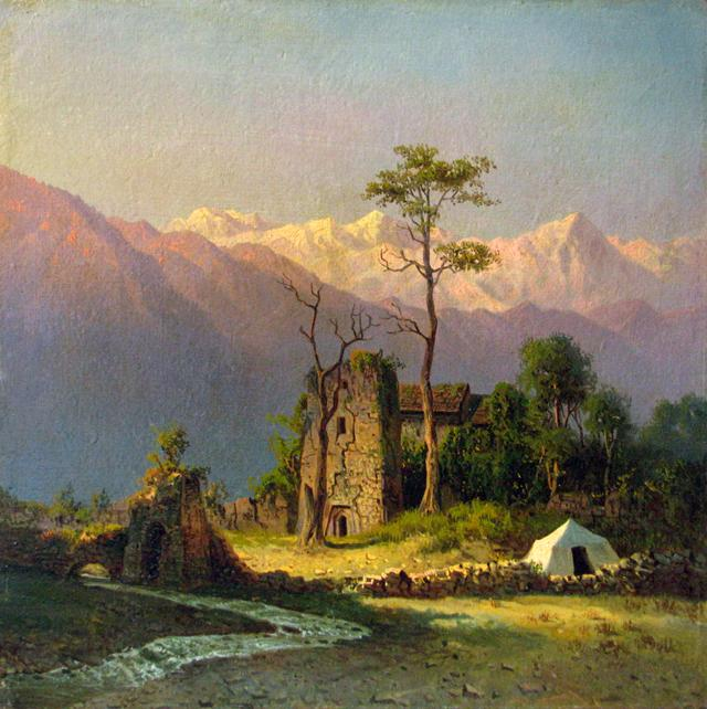 მხატვარი ილია ზანკოვსკი